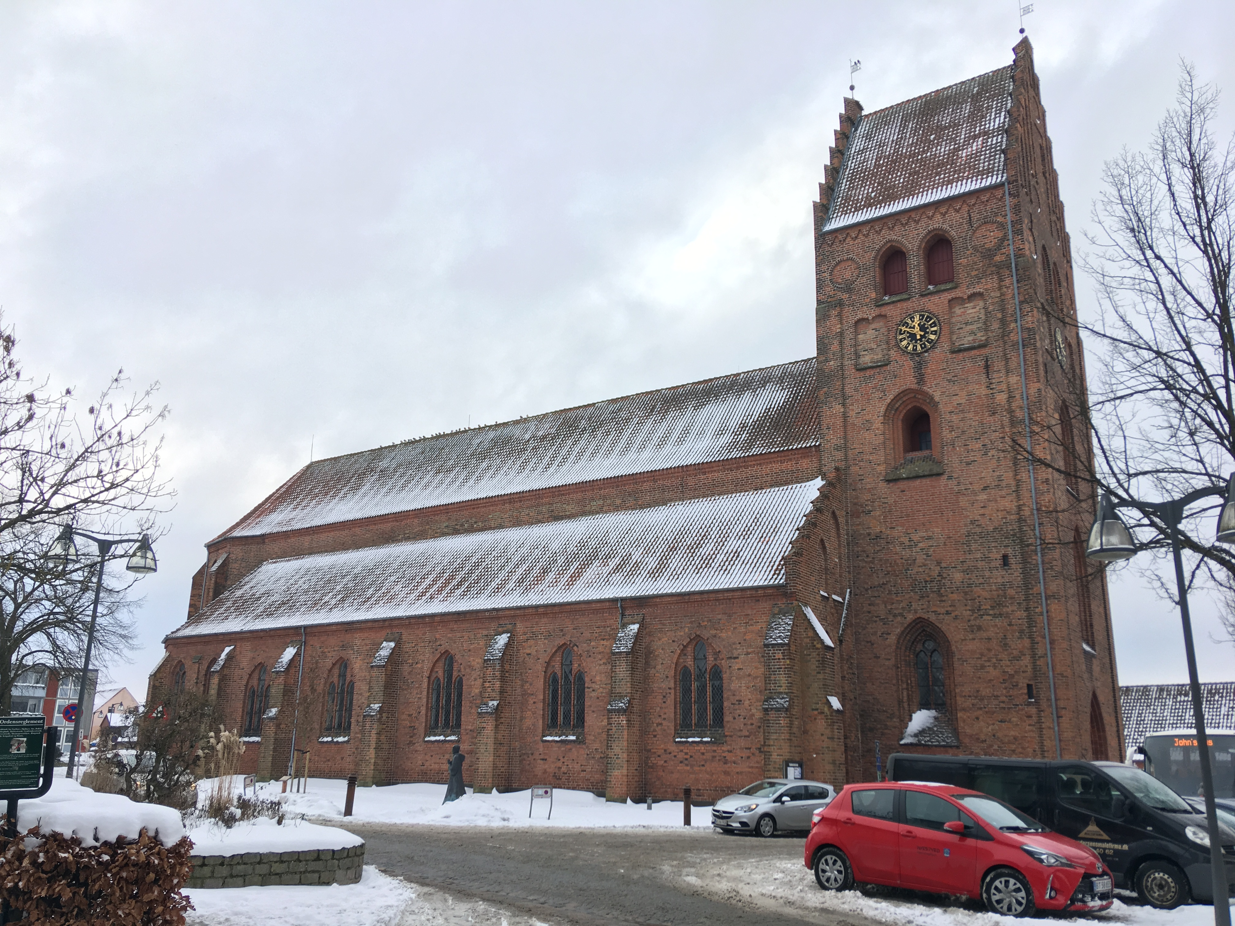 Sankt Peders Kirke i Næstved med sne på